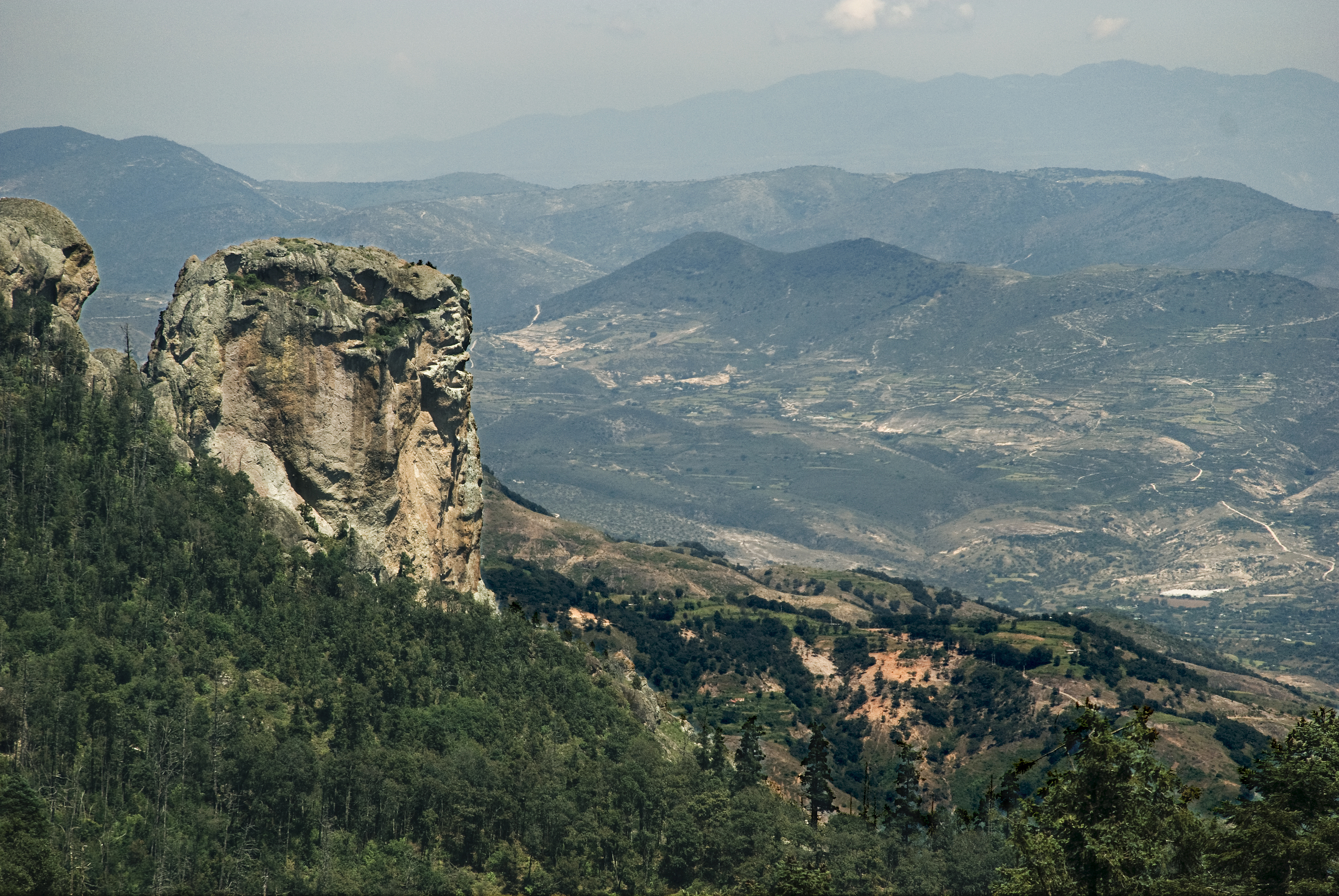 Panoramica del Parque Nacional El Chico